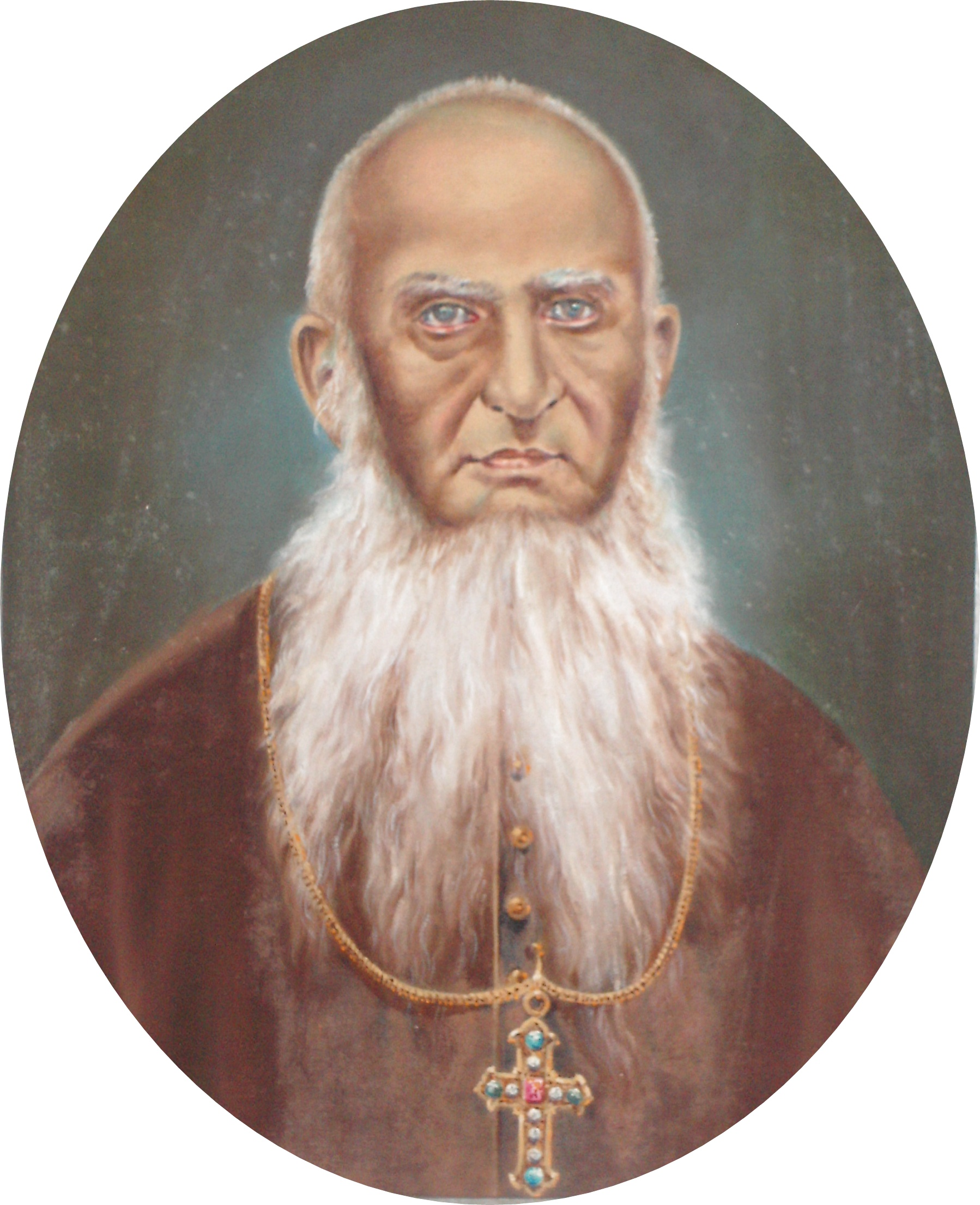 Bischof Ildephons Borgna (+ 1894), Apostolischer Vikar von Quilon, Indien, Ölportrait (1890) im Bischofshaus Quilon.